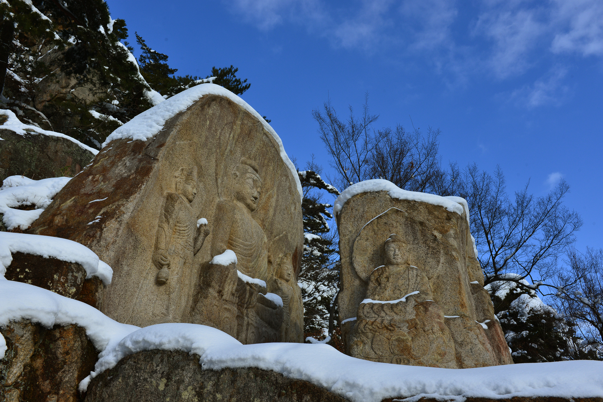 경주남산 칠불암마애불상군